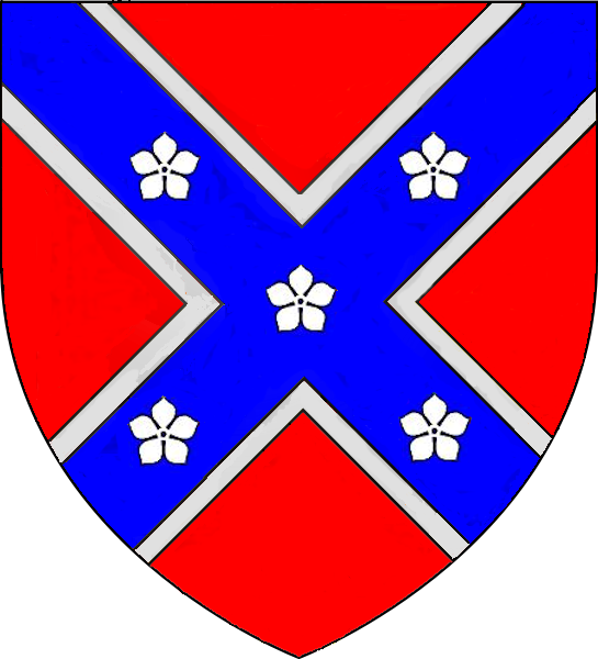 Blason de la Famille de Saint-Genois (environ de Tournai)